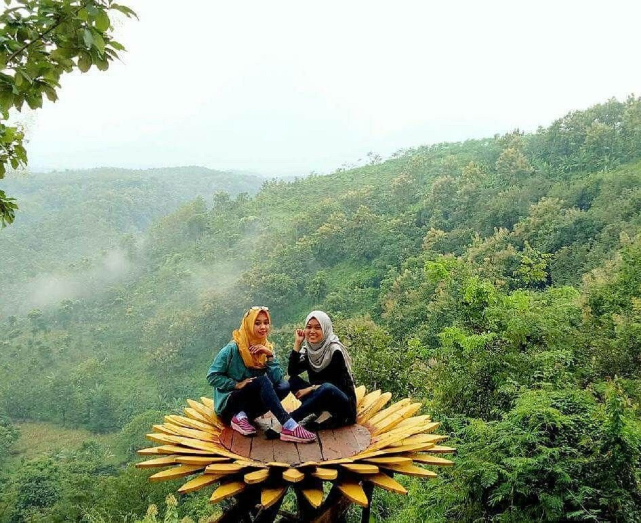 Wahanan buatan sangkar burung yang berada di area luar Gua Jepang Jombang